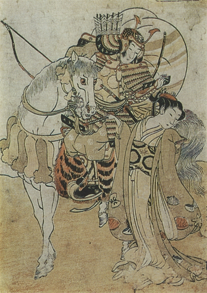 Parting